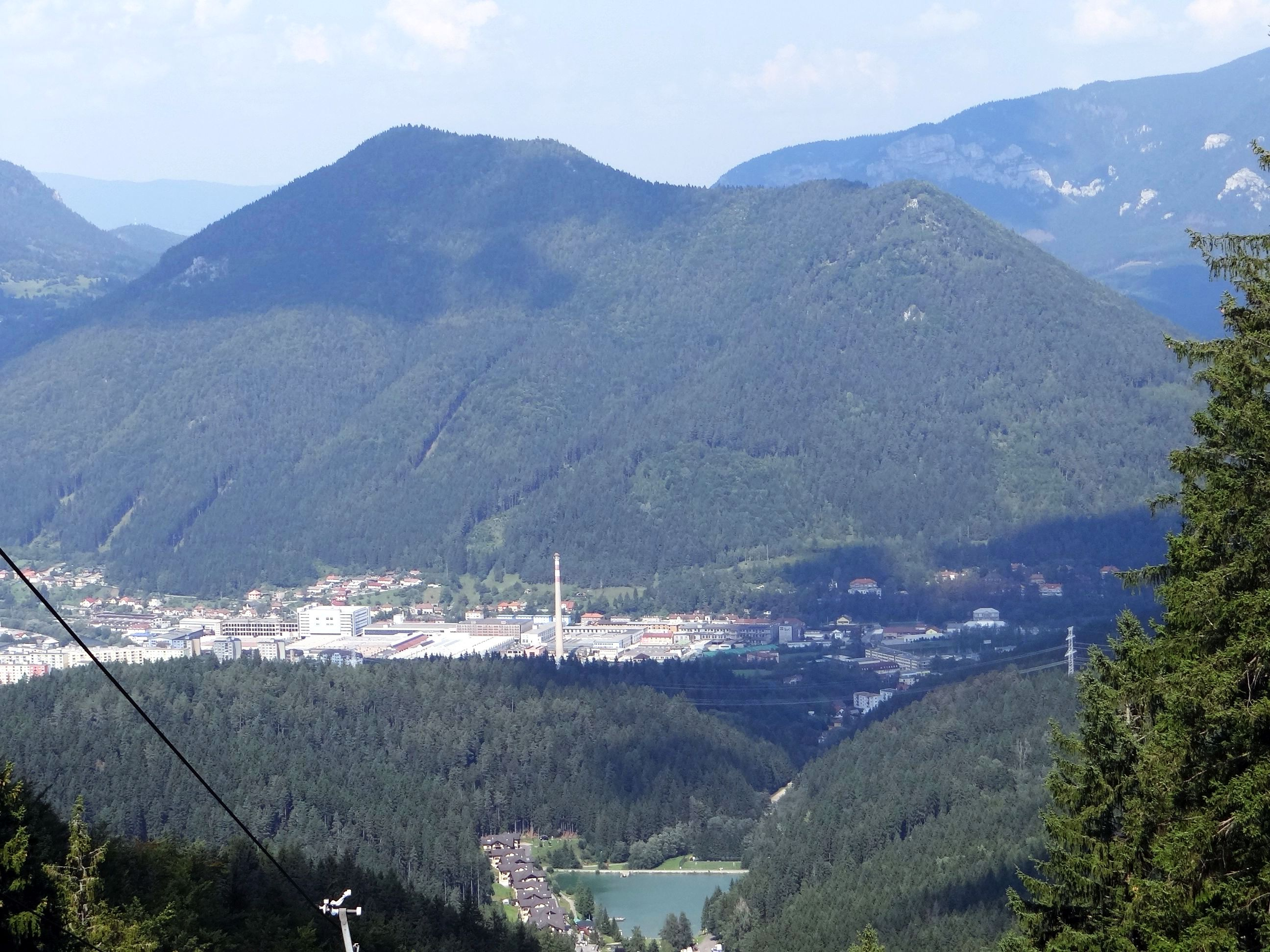 Čebrať